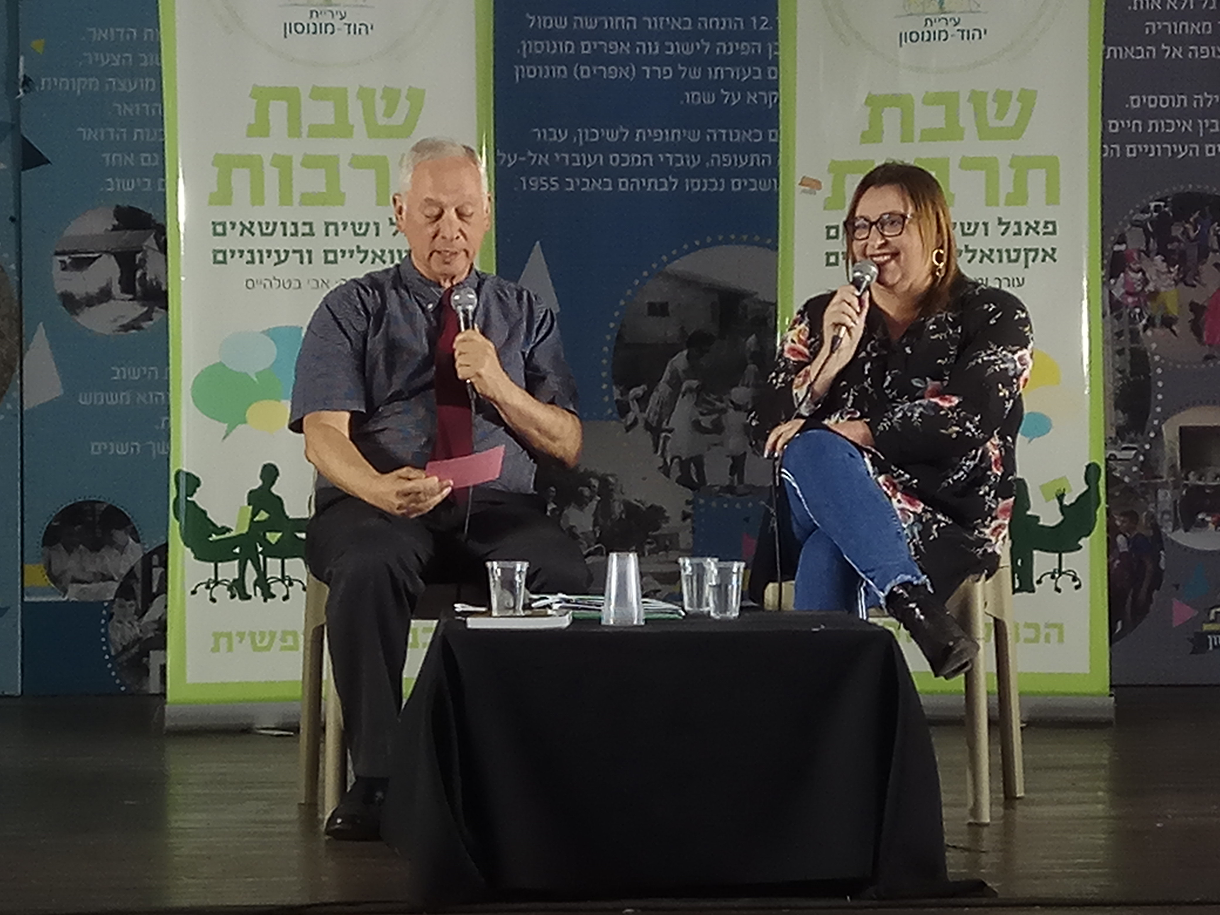 אוה מדז'יבוז' באירוע שבתרבות עם אבי בטלהיים בנווה מונוסון